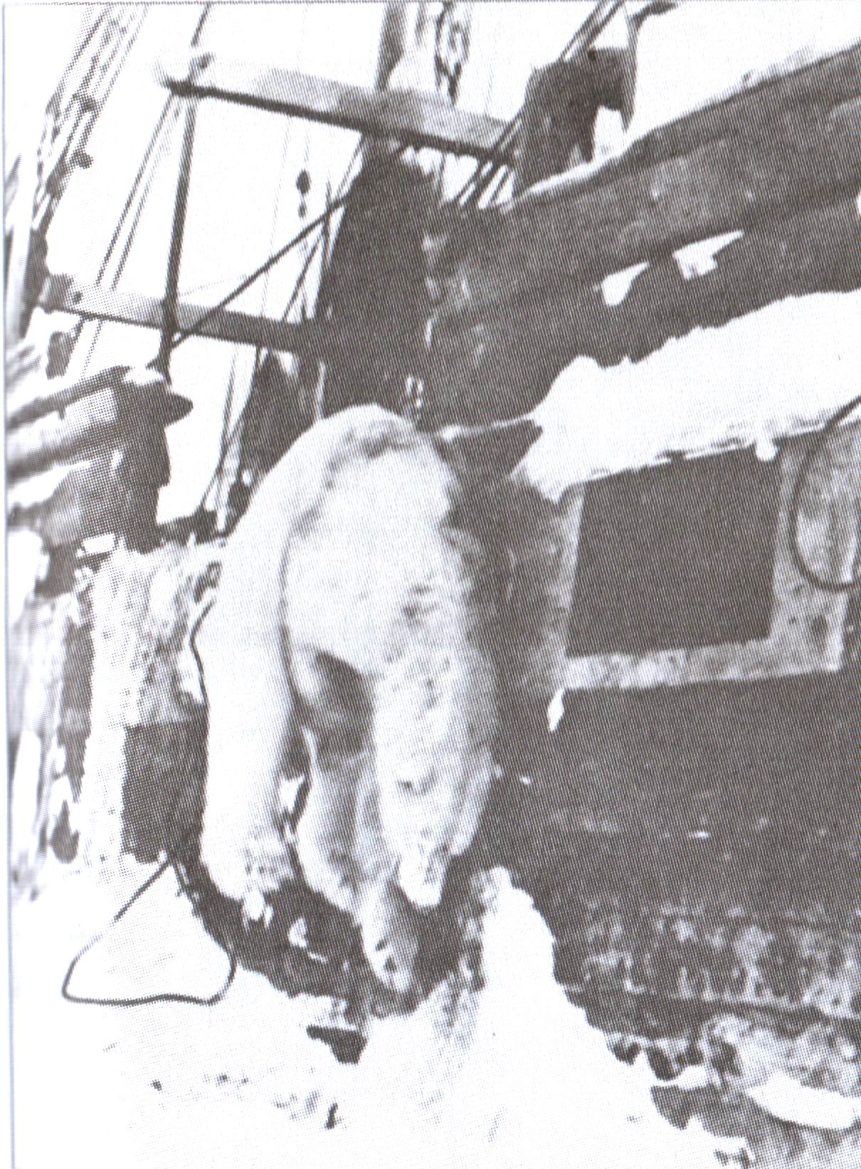 ПолярныйТрофей